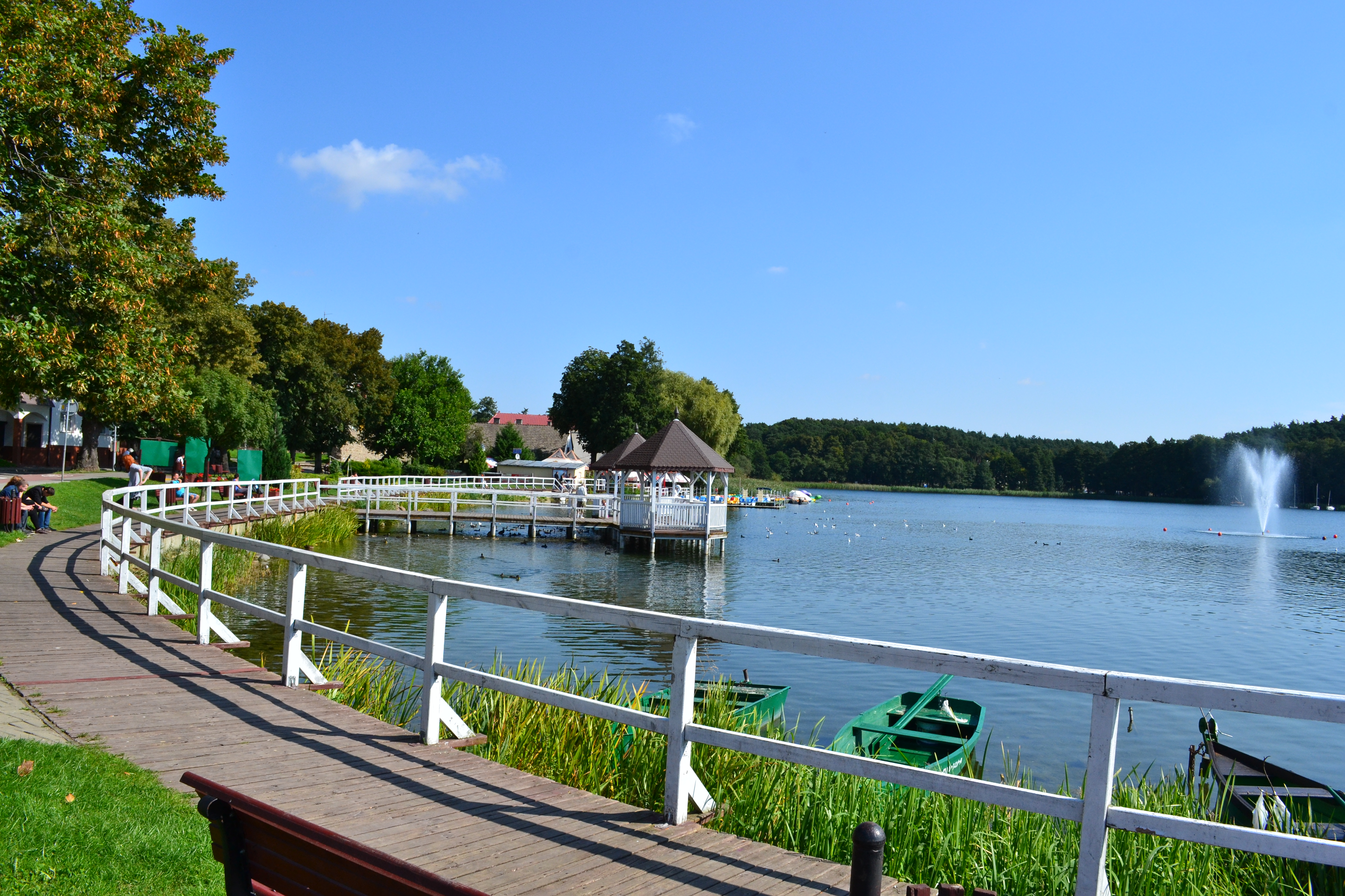 Jezioro Barlineckie